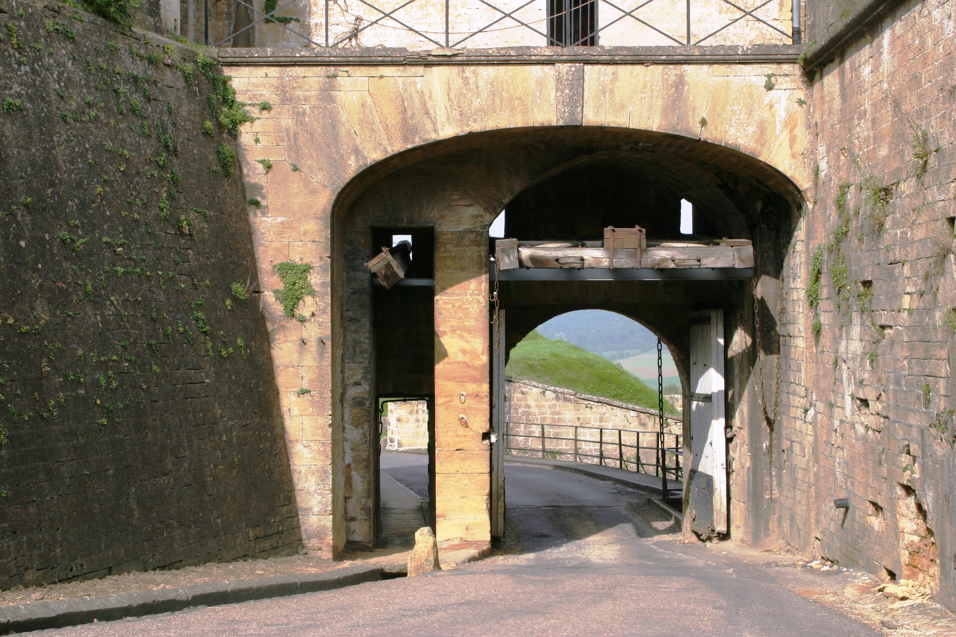 Eng Paart an der Festung vu Montmédy.